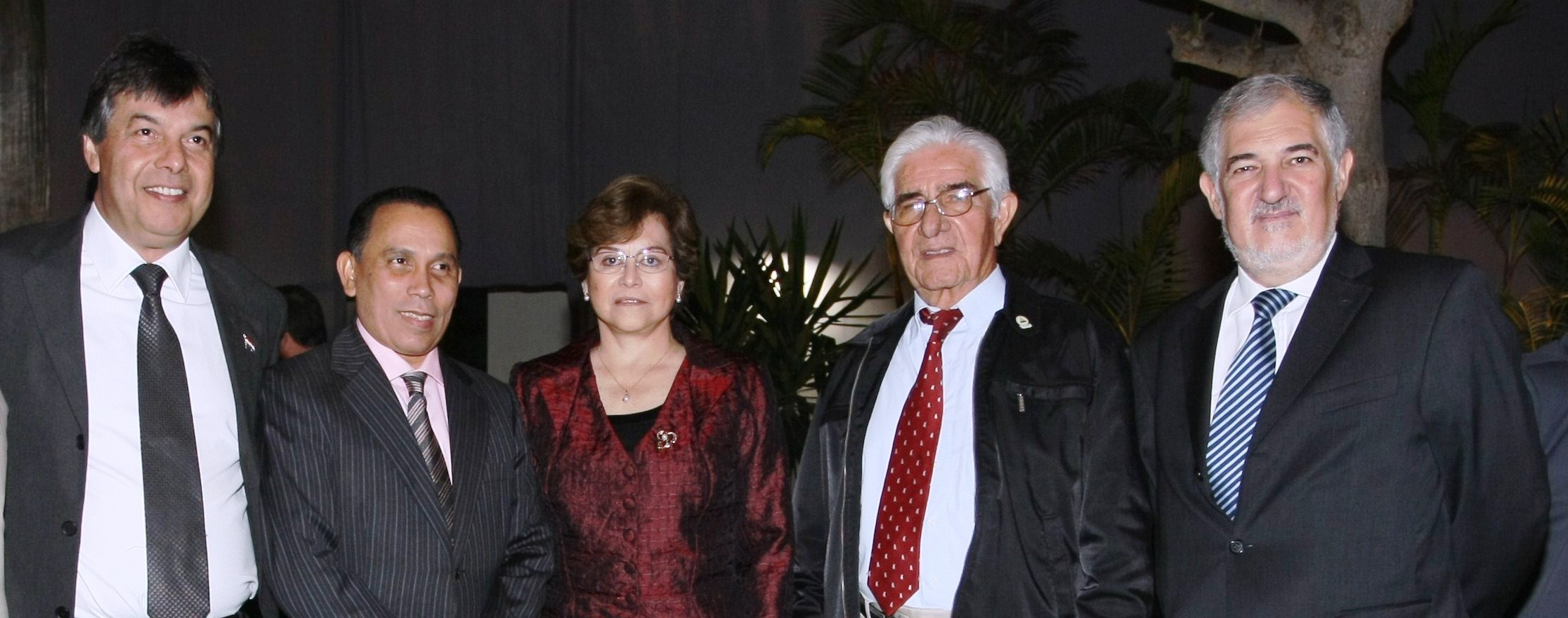 El Presidente y los Vicepresidentes de la AIAMP, con el Fiscal General de Nicaragua.